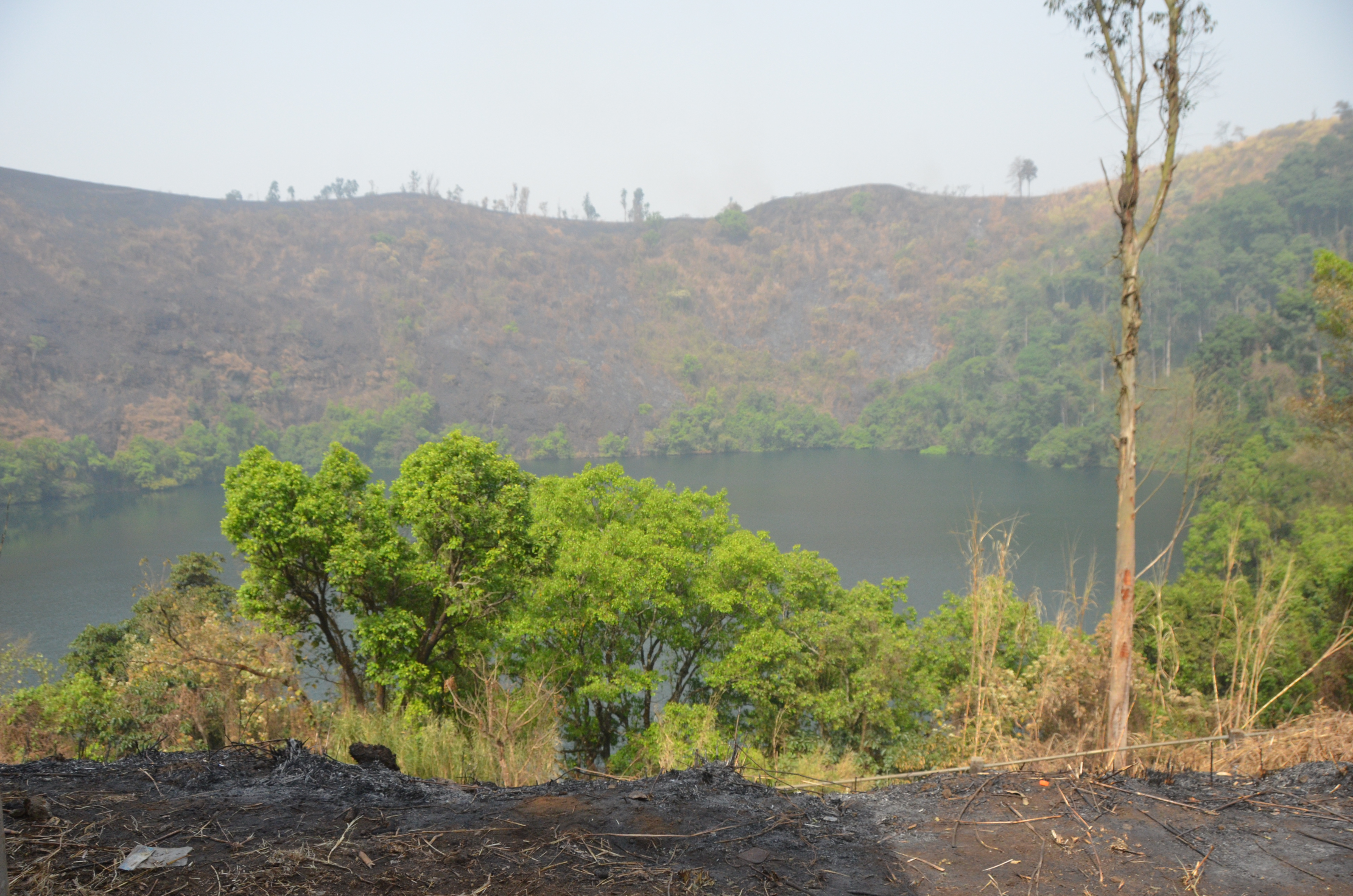 Le lac Baleng situé dans la chefferie Baleng; à l'Ouest du Cameroun